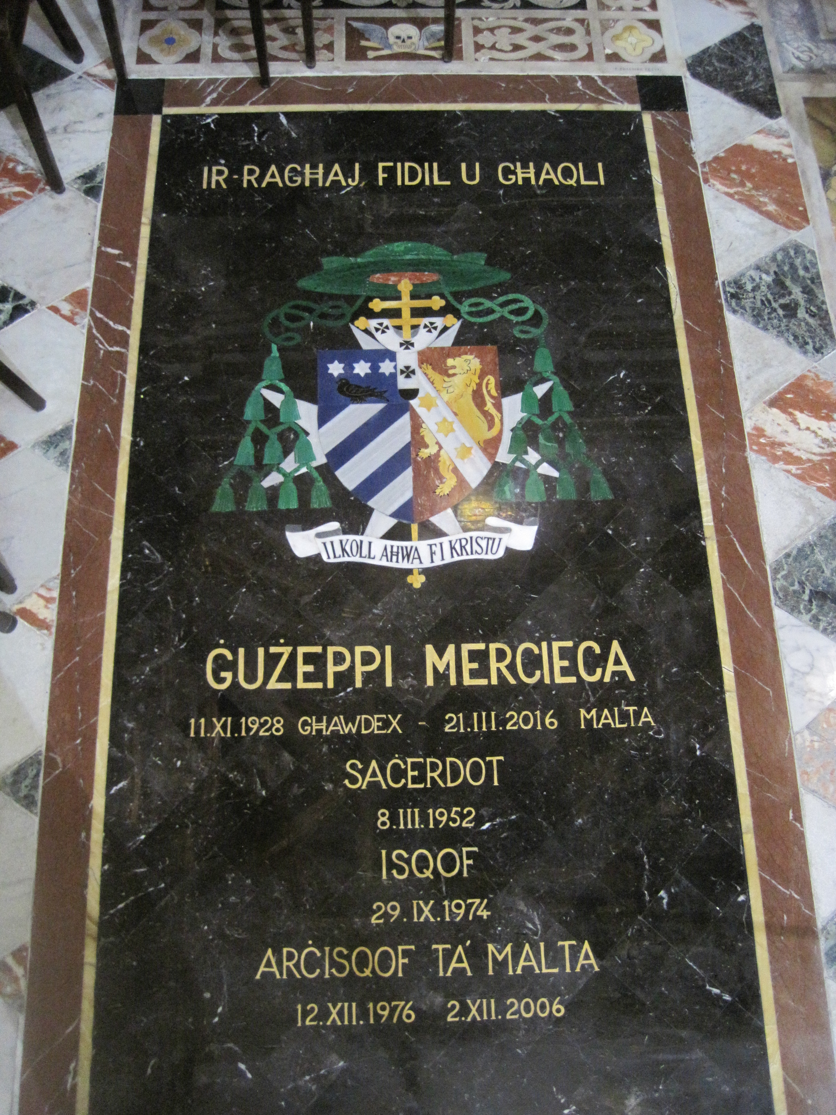 Dalle dans la cathédrale Saint-Paul de Mdina